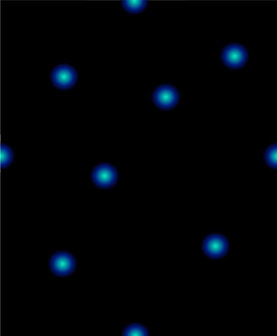 Schema d'un univers en tore bidimensionnel.